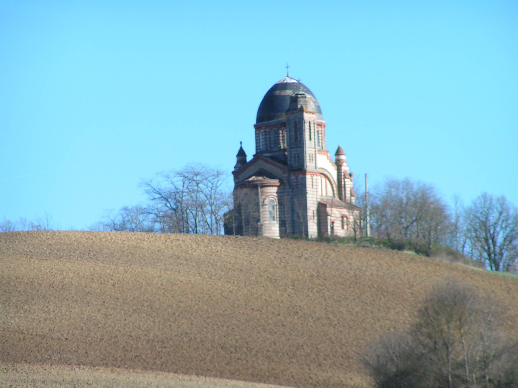 Lafrançaise